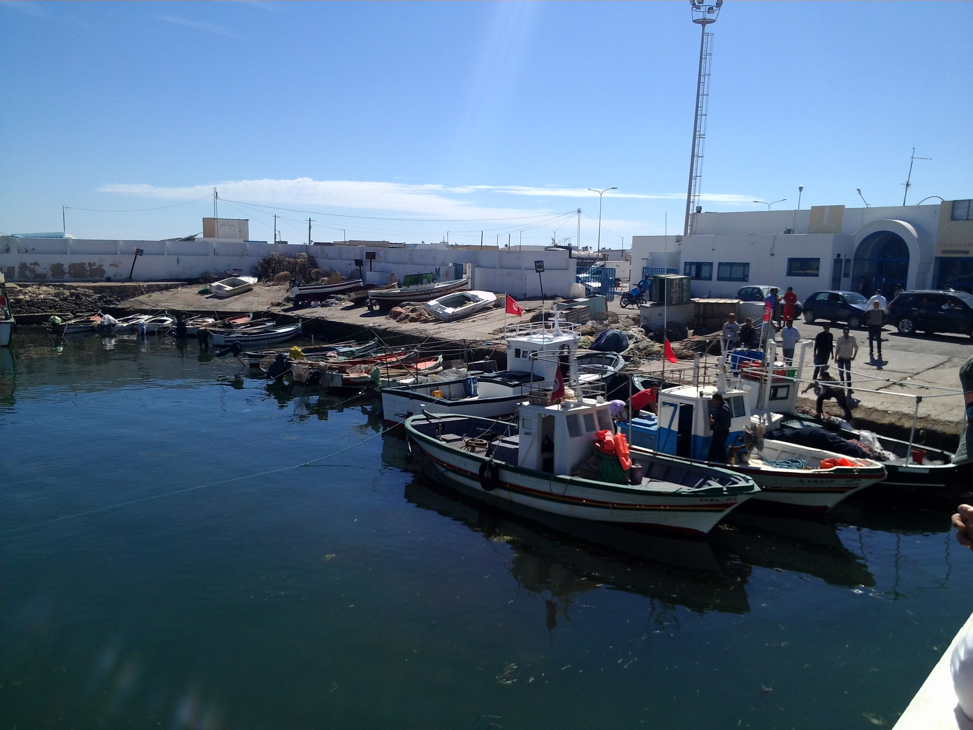 Порт на острові Гарбі